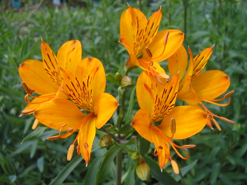 Description: Alstroemeria aurea, 9 juin 2004, Jardin des Plantes de Paris Source: Bouba Licence: GFDL Bouba